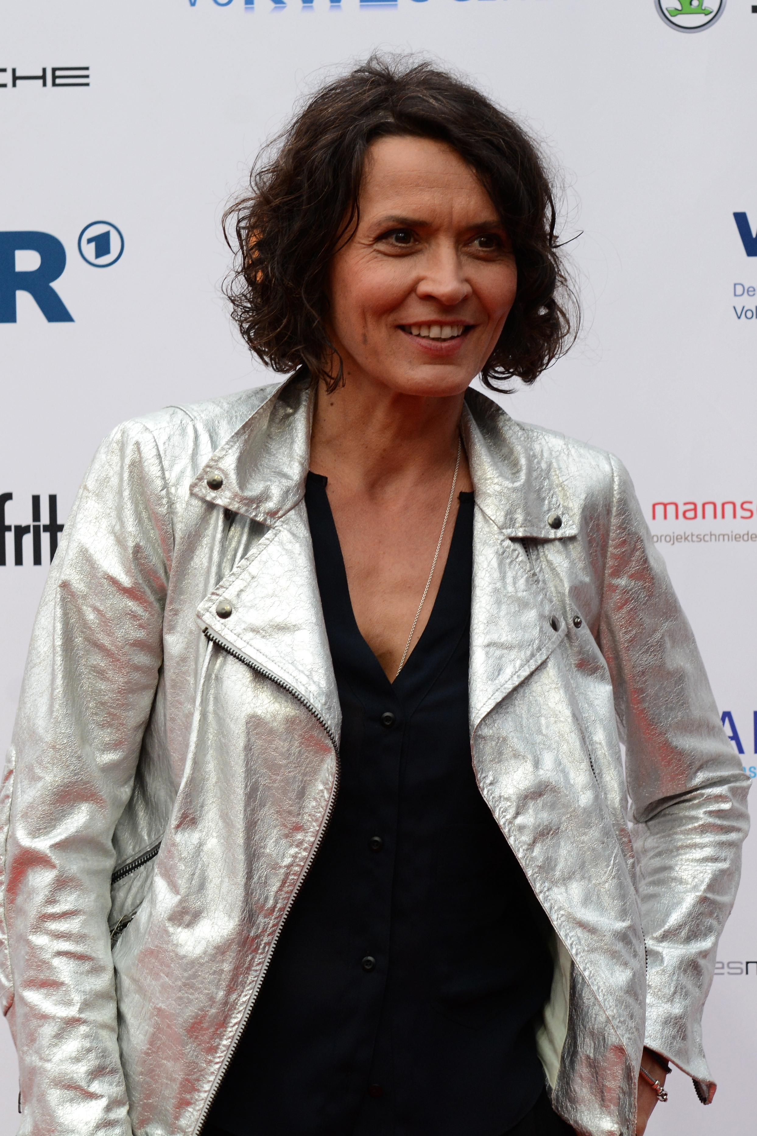 Ulrike Folkerts bei der Verleihung des Grimme-Preises 2014.